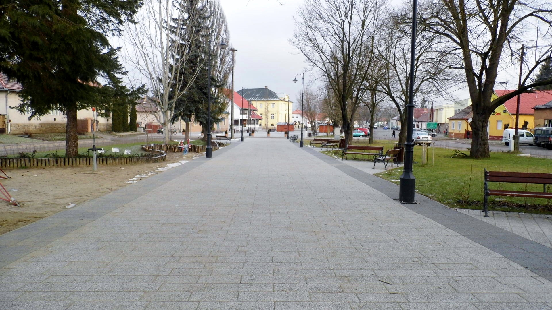 Pétervására főtere